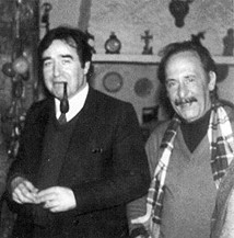 Se observa a Luis Gómez Llorente (izq.) y Pablo Castellano Cardalliaguet, miembros de la corriente Izquierda Socialista del PSOE